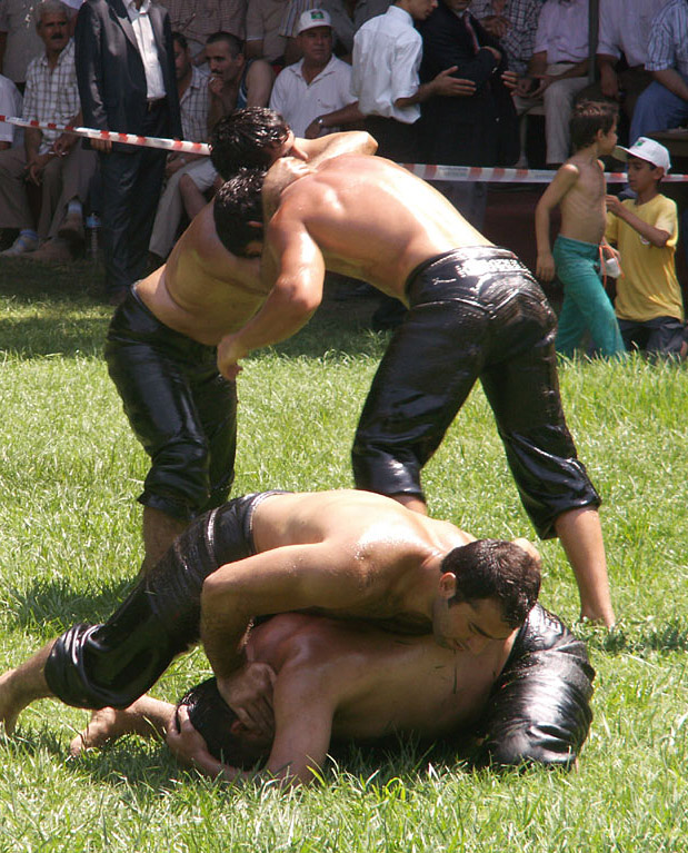 Oliestoei in Turkye